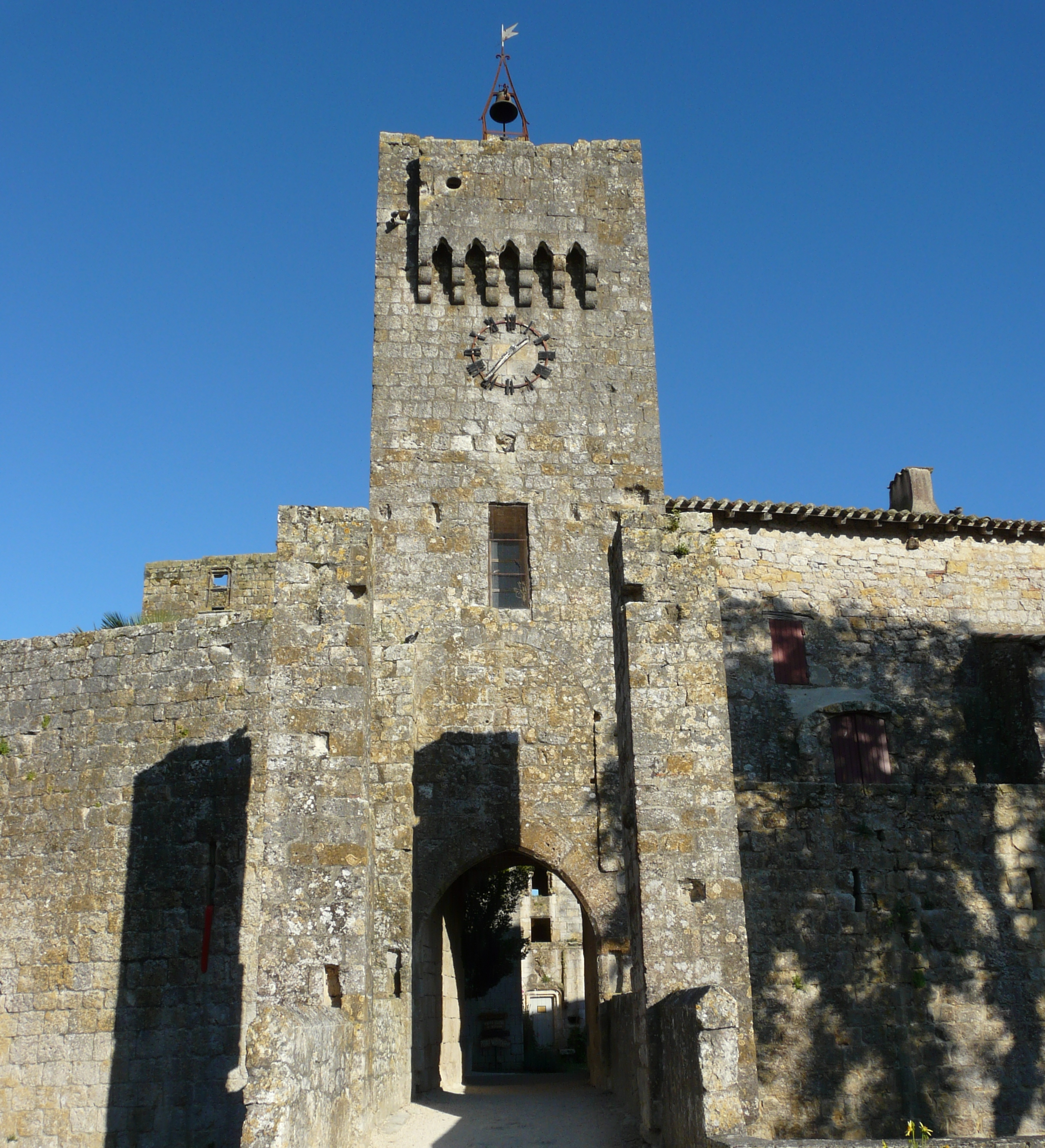 Enceinte fortifiée de Larressingle : entrée du village This building is en partie classé, en partie inscrit au titre des Monuments Historiques. .